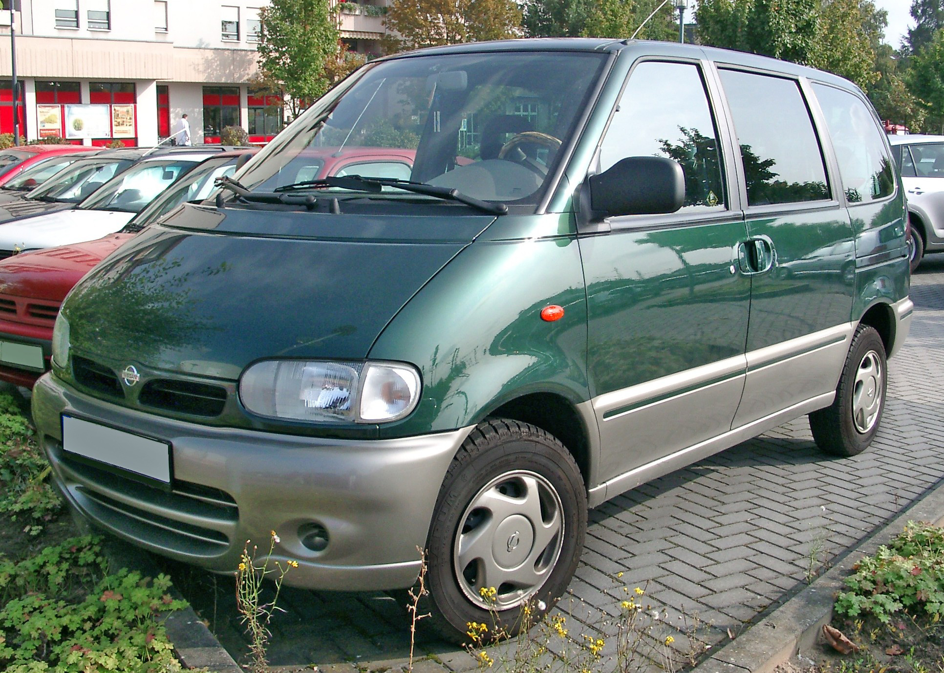 Nissan Serena